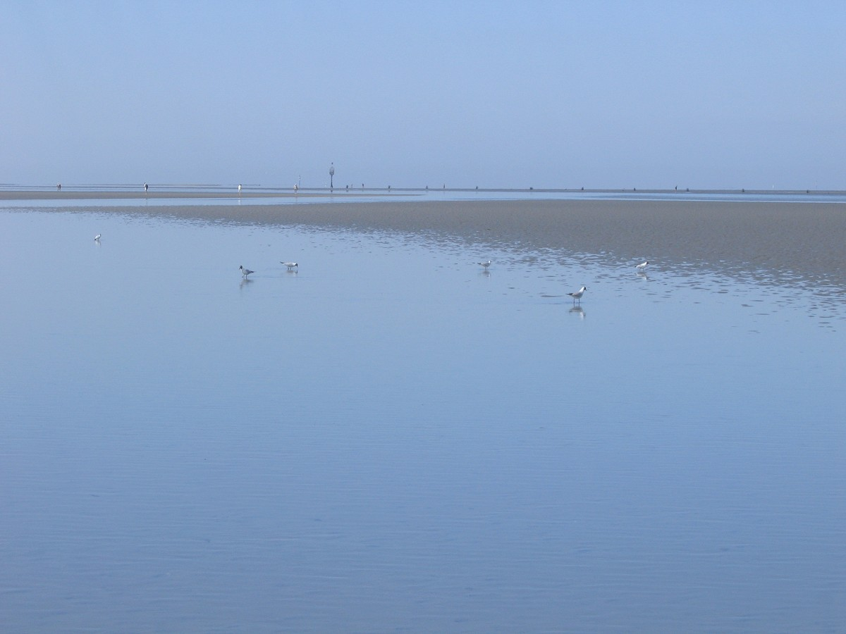 Watt bei Duhnen